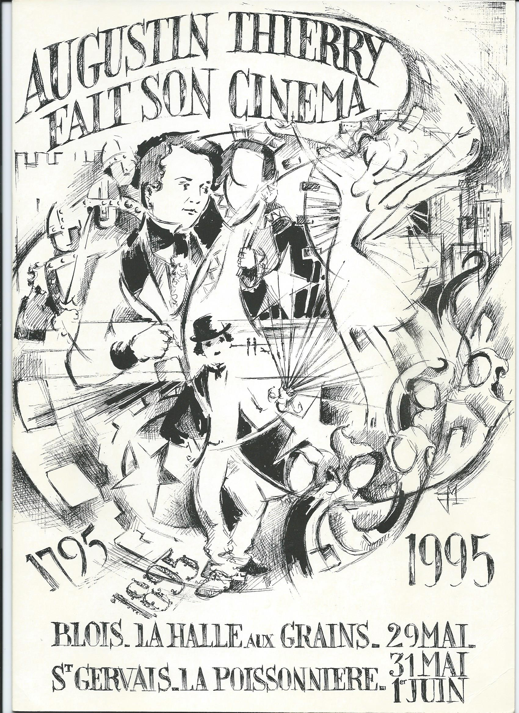 Affiche du spectacle "Augustin fait son cinéma" (comédie musicale) Collège-lycée Augustin-Thierry 1995